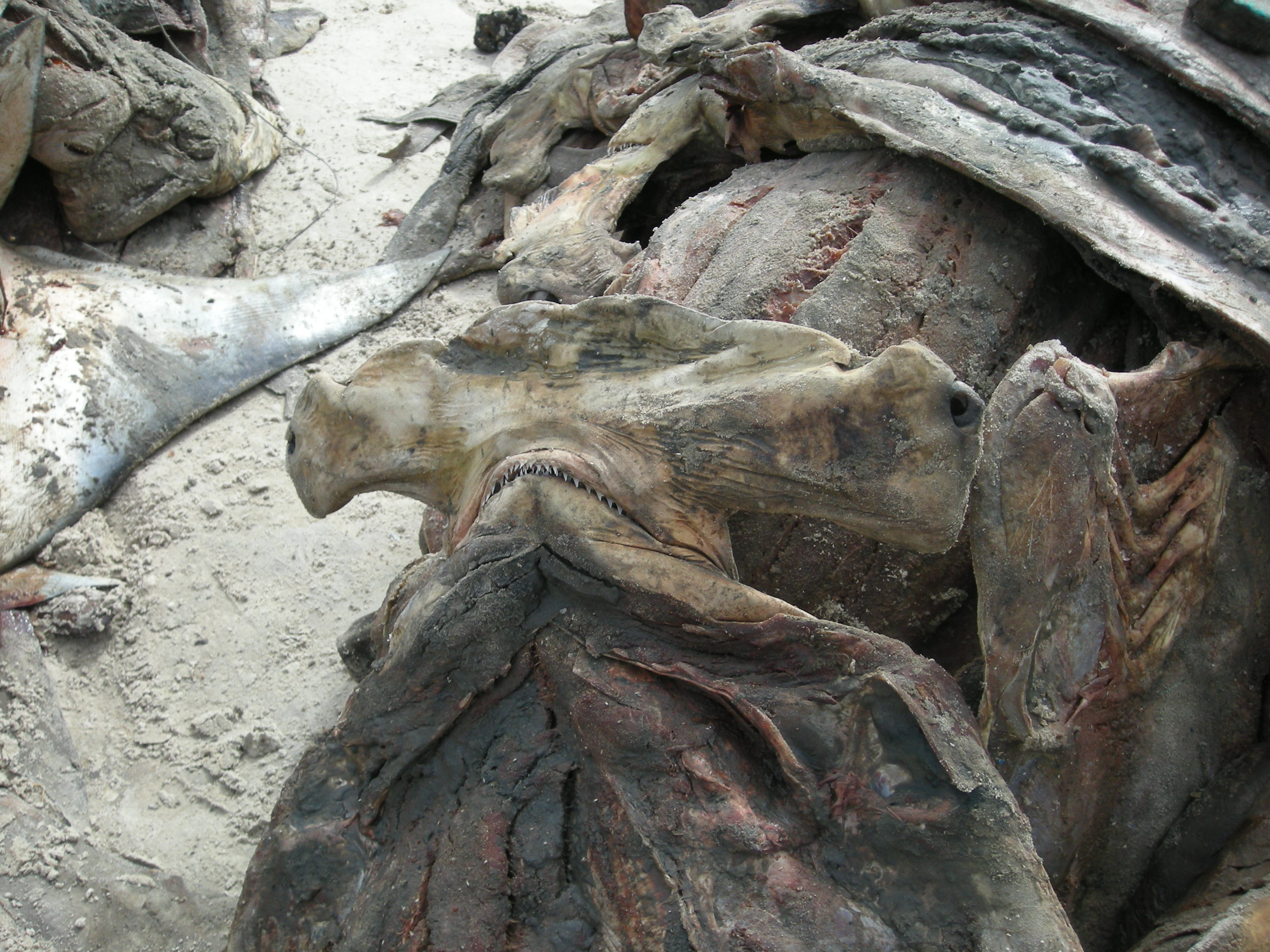 Requins-marteaux dans le port d'Elinkine (Casamance, Sénégal)